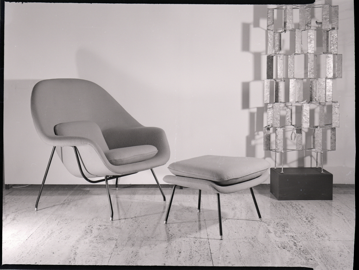 Poltrona Saarinen realizzata dal designer Eero Saarinen nel 1956 per l'azienda Knoll, fotografata per la rivista Zodiac. Servizio fotografico : Italia, 1975 / Paolo Monti. - Buste: 12, Fototipi: 13 : Negativo b/n, gelatina bromuro d'argento/ pellicola ; 10x12. - ((Serie costituita da 12 negativi identificati con i nn.: 1709-1721. Sulla busta G1709/10 manoscritto: "Knoll/ Poltrona/ Saarinen/ Zodiac". Numerazione parallela: 1-12. La suddetta serie è contenuta nella scatola identificata con la numerazione G1676/1737. Sul coperchio della scatola manoscritto: "Zodiac 1/ 1-77". - Fonte: Rubrica di Paolo Monti: Archivio 10x12 (ultimi numerati) - dal G1 al (s.d.), presso Archivio Paolo Monti